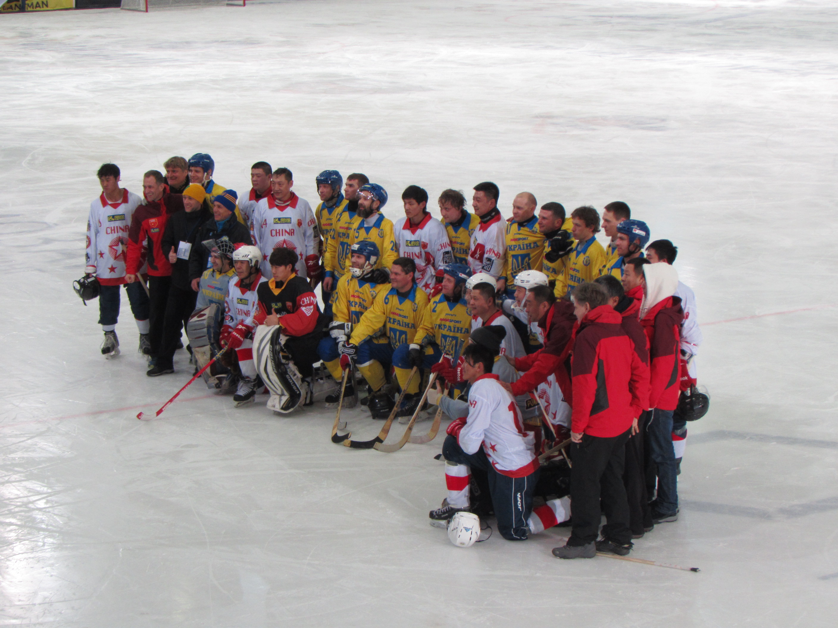 Збірна України з хокею з м’ячем